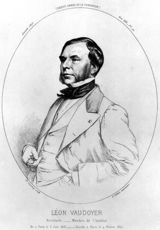 Léon Vaudoyer, architecte, membre de l'Institut